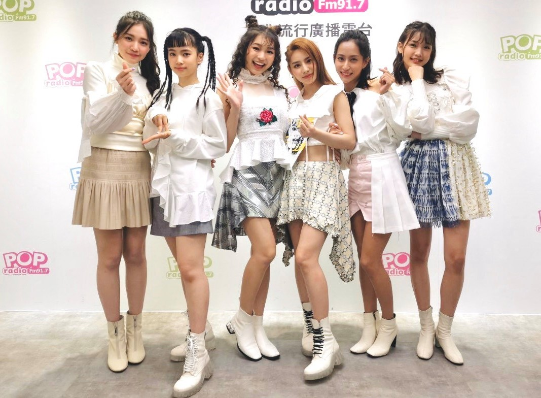 PER6IX參加POP Radio廣播電台節目